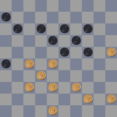 Zelfgemaakt diagrammetje